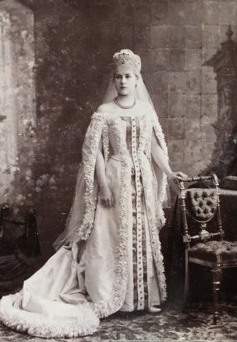 Княжна Ольга Николаевна Репнина-Волконская, в замужестве герц. Лейхтенбергская (1872—1953).